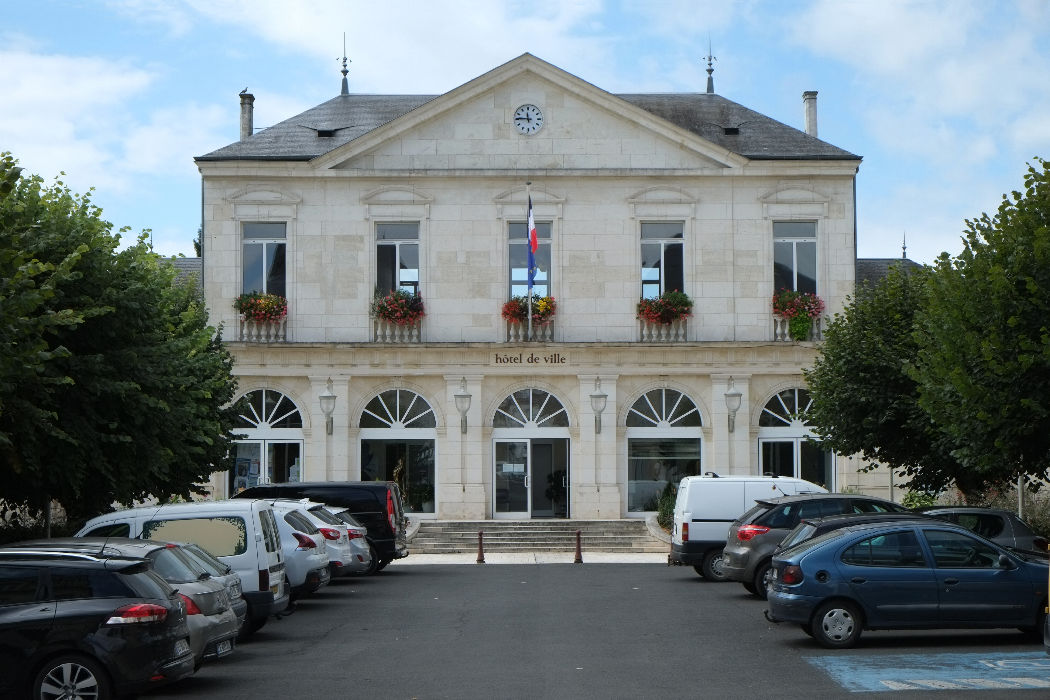 Hôtel de ville Matha Charente-Maritime France